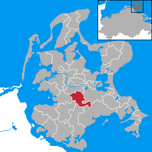 Sehlen, Landkreis Rügen, Mecklenburg-Vorpommern